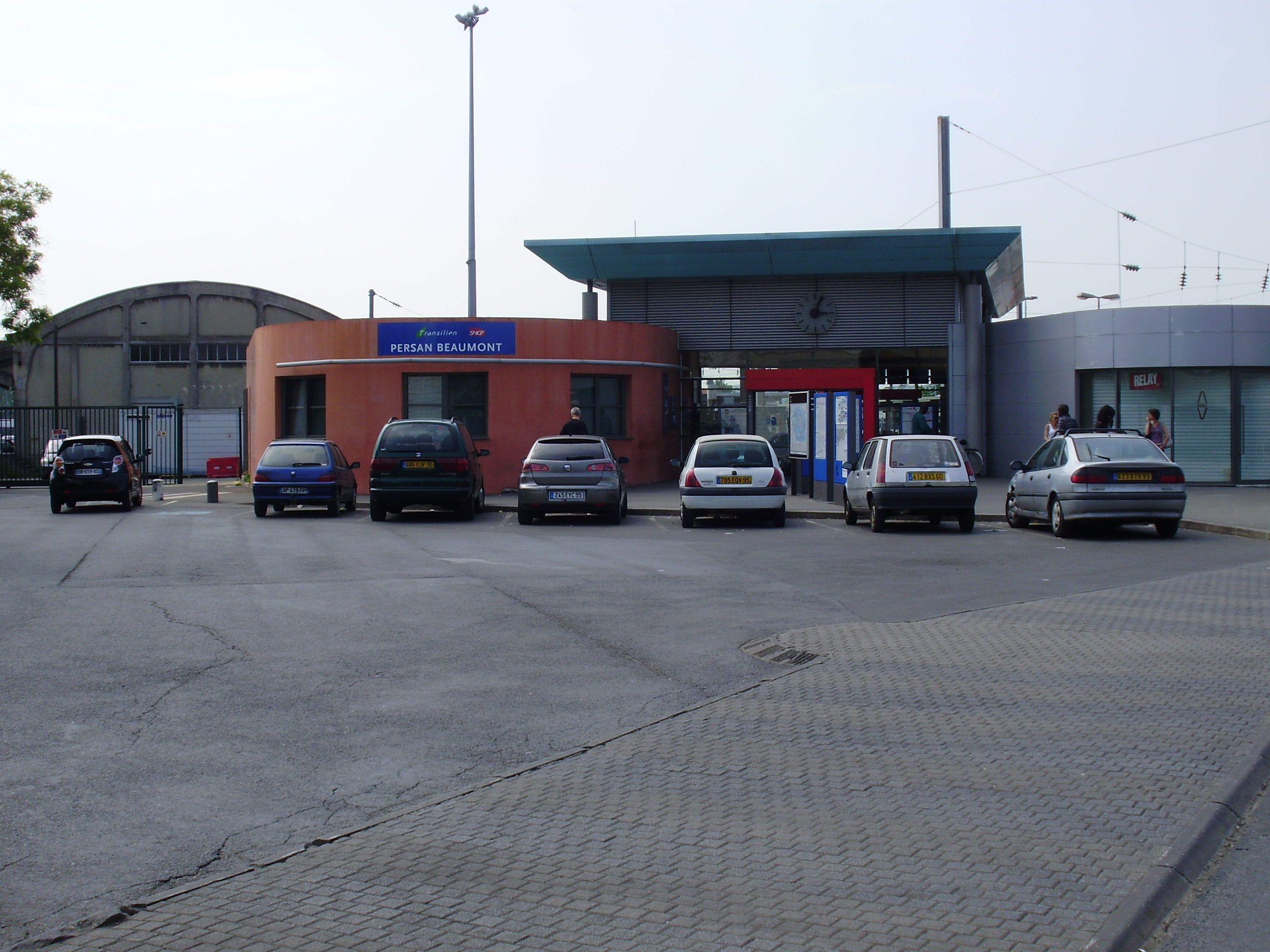 Gare de Persan - Beaumont, à Persan, Val-d'Oise, France : entrée du bâtiment voyageurs